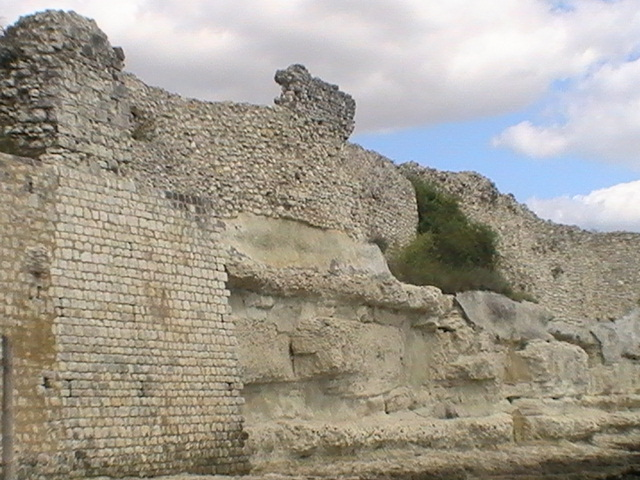 rempart de Talmont-sur-Gironde